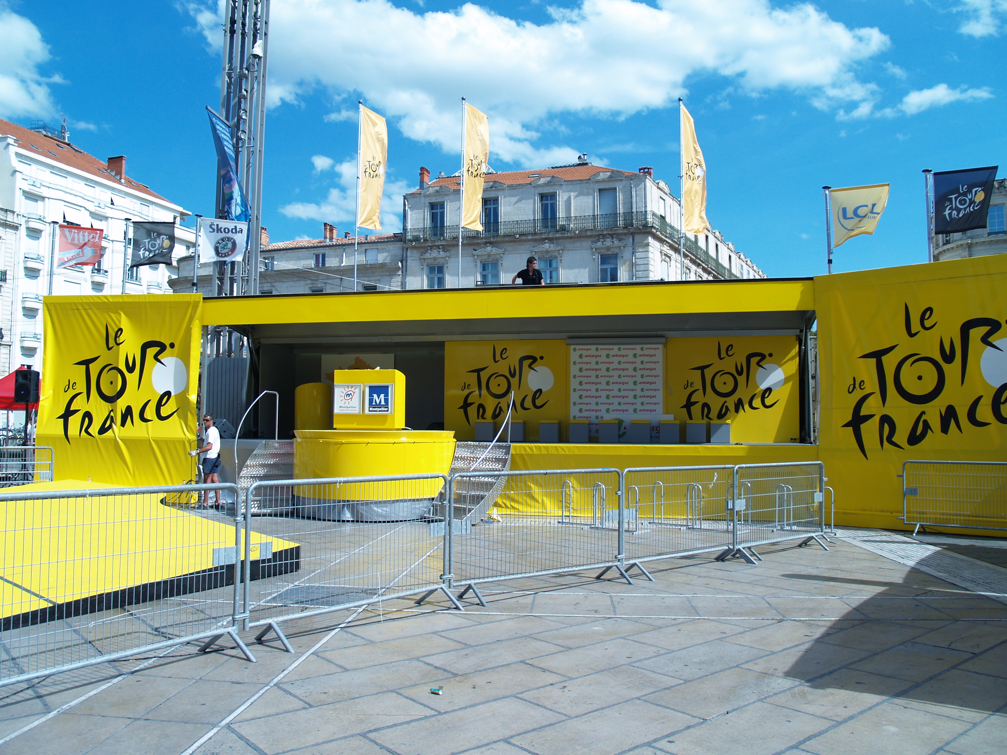 Podium de départ du tour de France 2009 sur la place de la comédie à Montpellier en France.